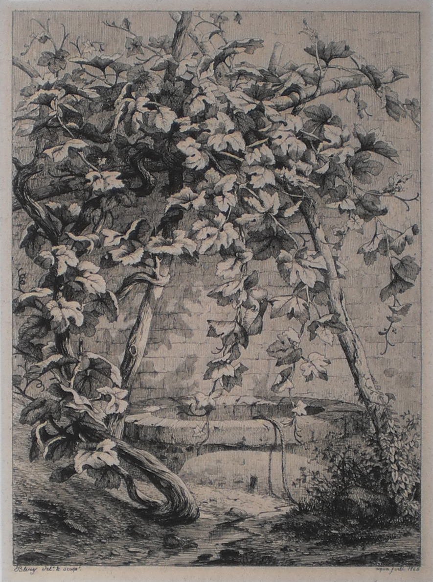 La Vigne au Puits, ou Le Cep de Vigne, une estampe d'Eugène Bléry de 1845.